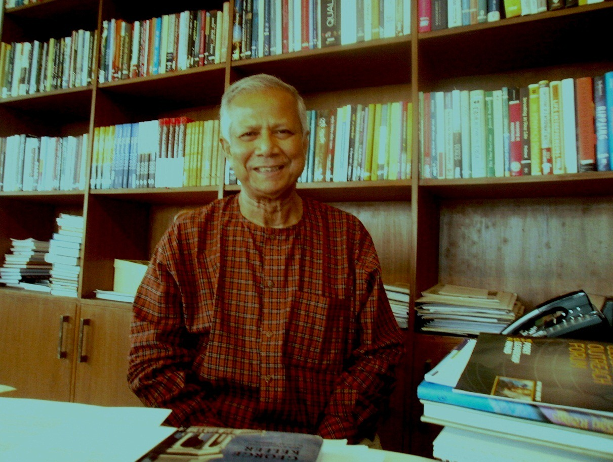 মুহাম্মদ ইউনূস নিজ গ্রন্থাগারে